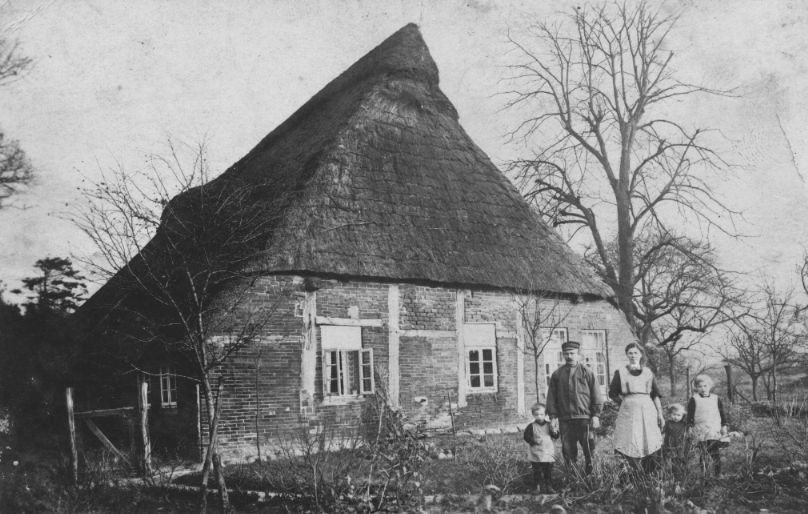 Altes Strohdachhaus um 1920. Artikel verfasst: Helmut Schwarting Originalbild wurde eingescannt